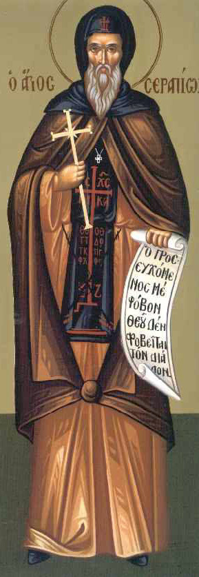 Pintura de São Serapião